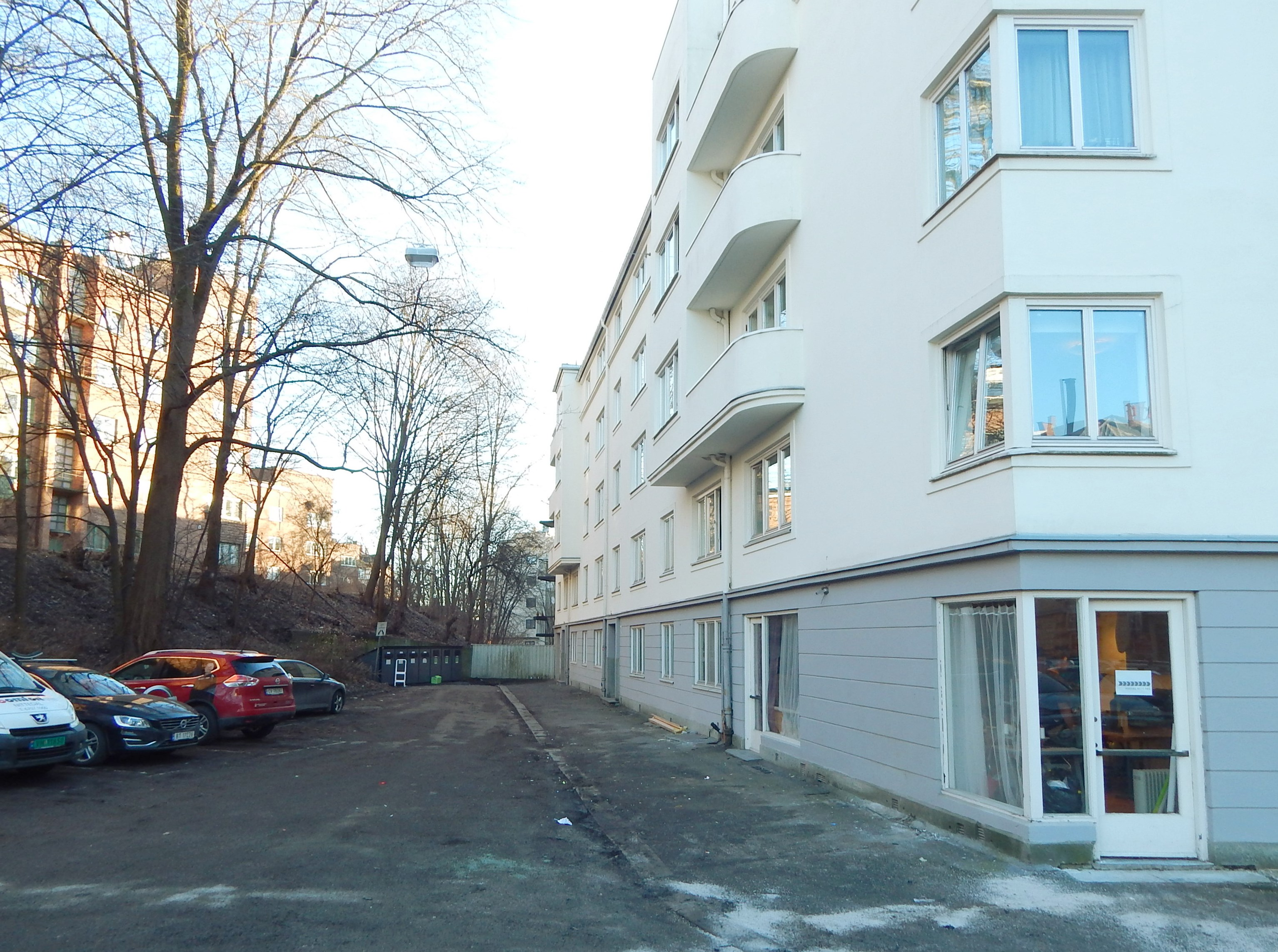 Fritz Thaulows gate på Majorstuen